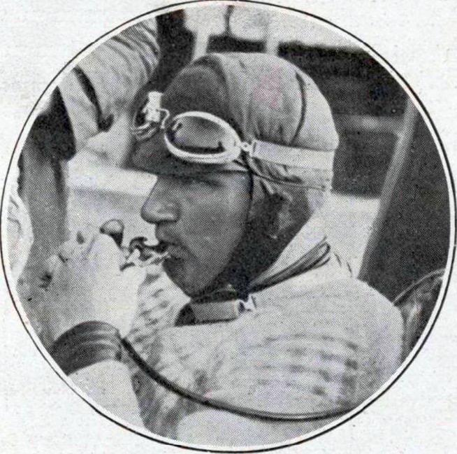 Antonio Ascari, au départ de son Grand Prix fatal de l'A.C.F. en 1925.